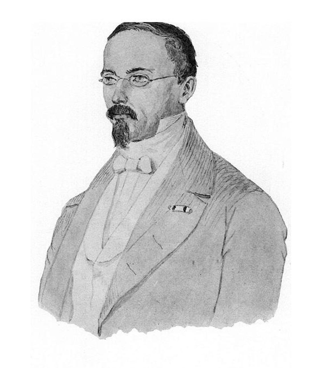 Aquarellierte Bleistiftzeichnung des Arztes und Abgeordneten Cajetan Koller (1798-1872)